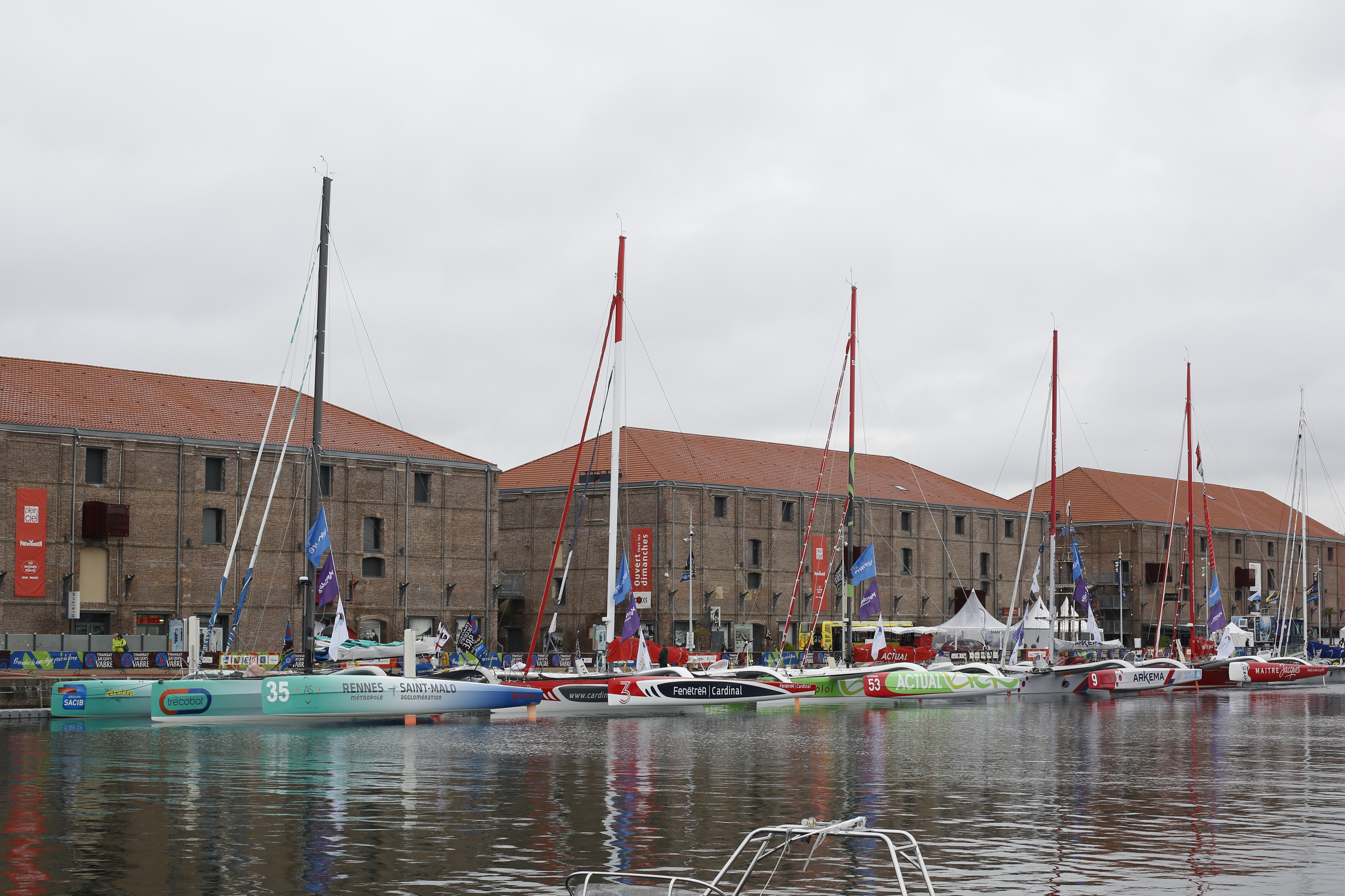 La flotte des Multi50 avant le départ de la Transat Jacques Vabre 2013.